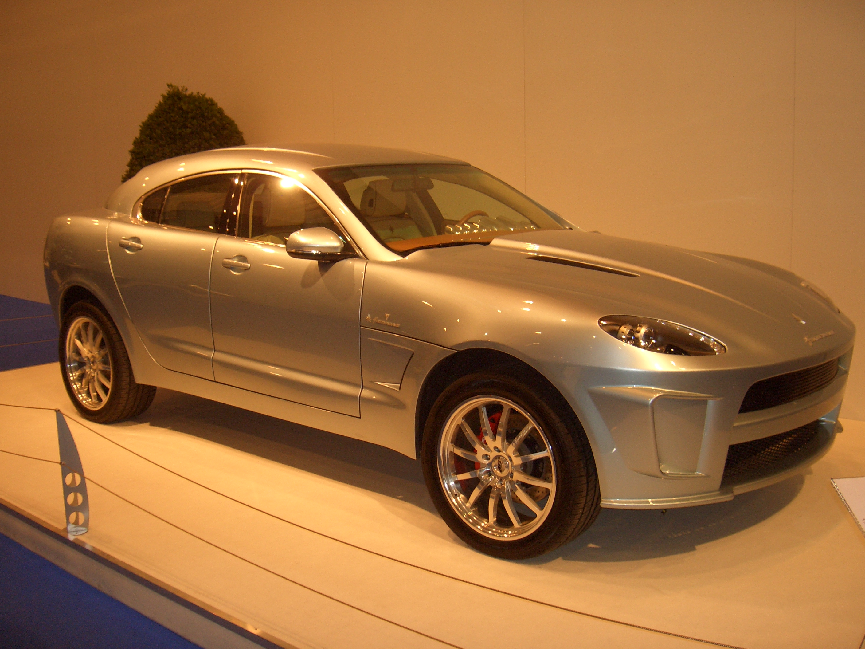 Fornasari RR99, seen at MOTOR SHOW ESSEN 2011